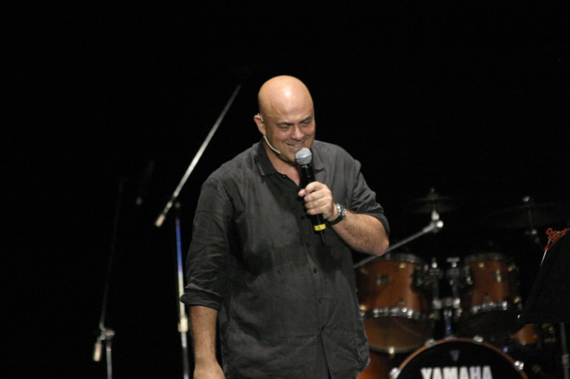 Maurizio Crozza